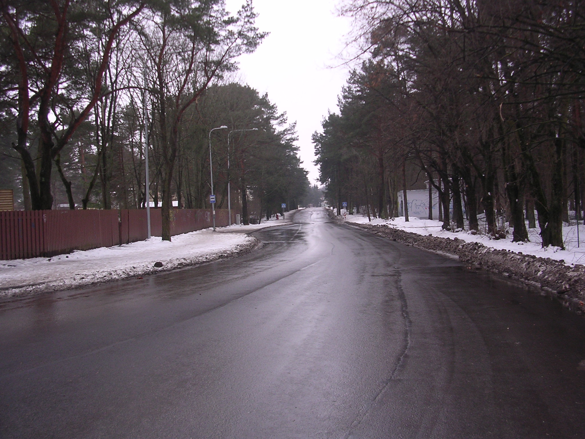 Vabaõhukooli tee